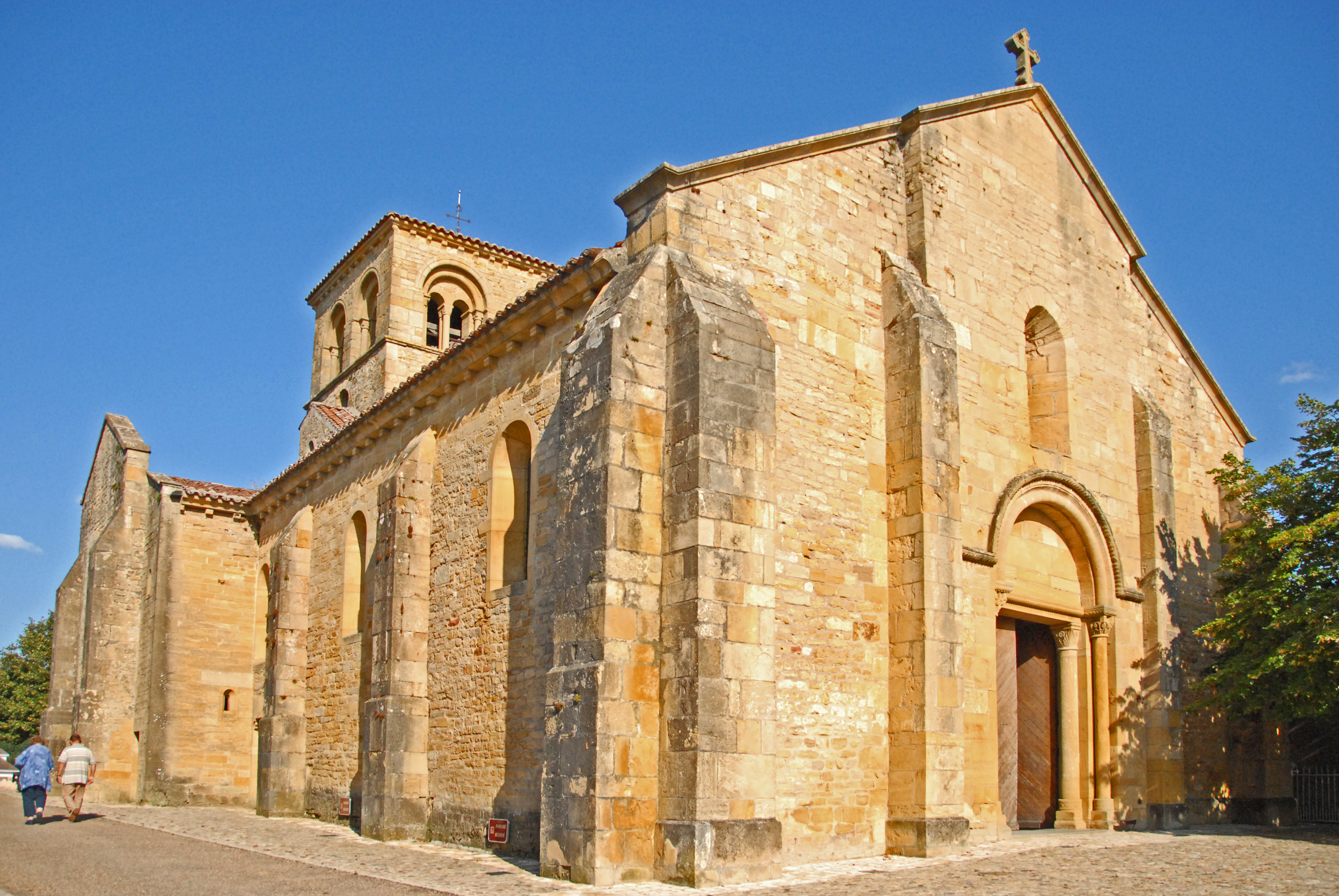 St-André d'Iguerande, Langhaus mit Fassade von Westen